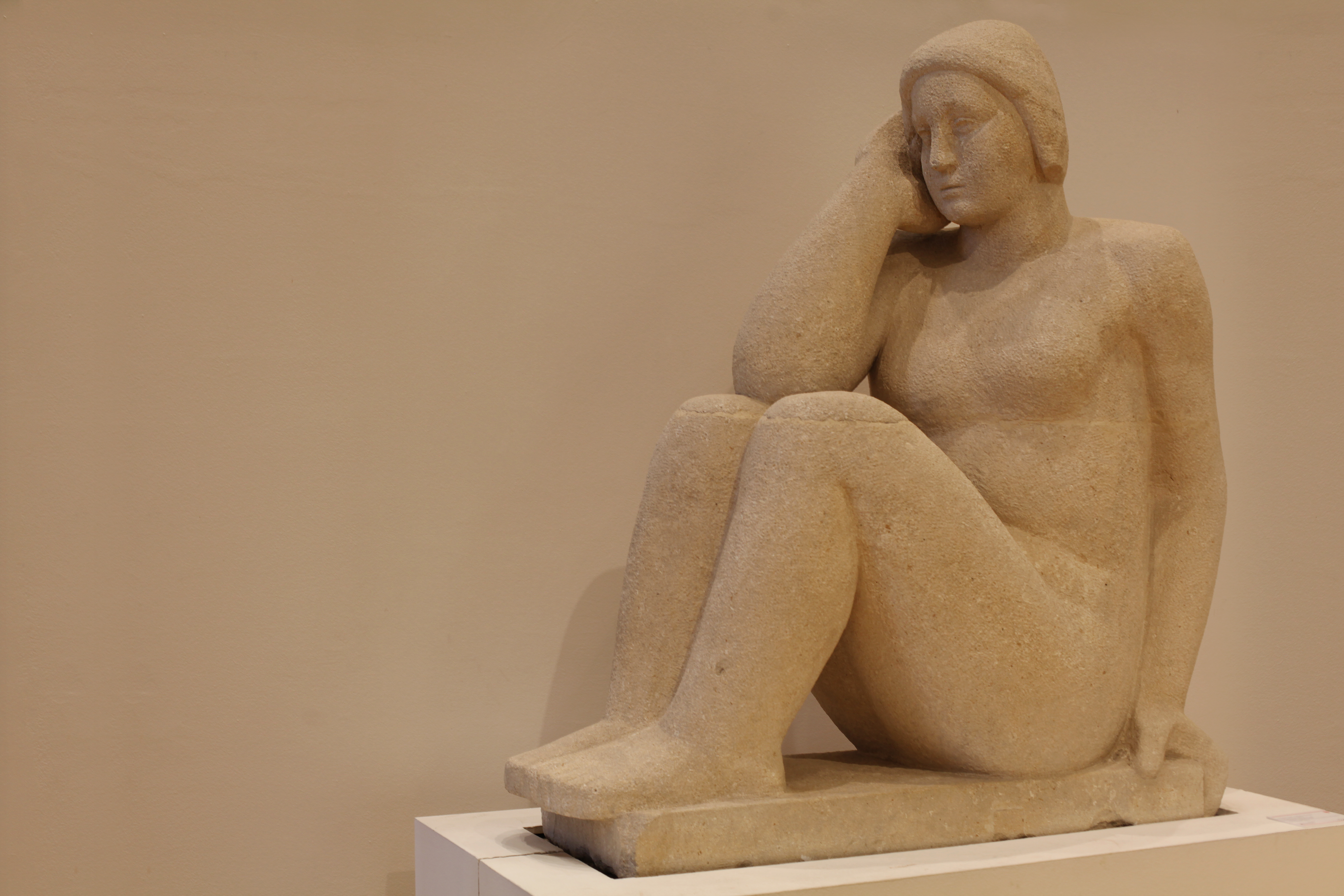 Leone Lodi e Mario Sironi, Statua di donna seduta (1933). Realizzazione di Leone Lodi (1900-1974) su disegno di Mario Sironi (1885-1961), esposta a La pittura murale e la scultura decorativa (1933), V Triennale di Milano